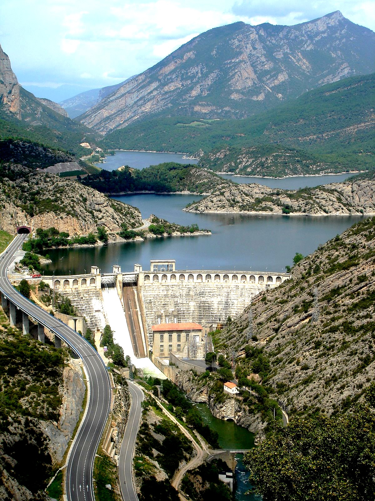 Panoràmica del pantà d'Oliana (Alt Urgell)